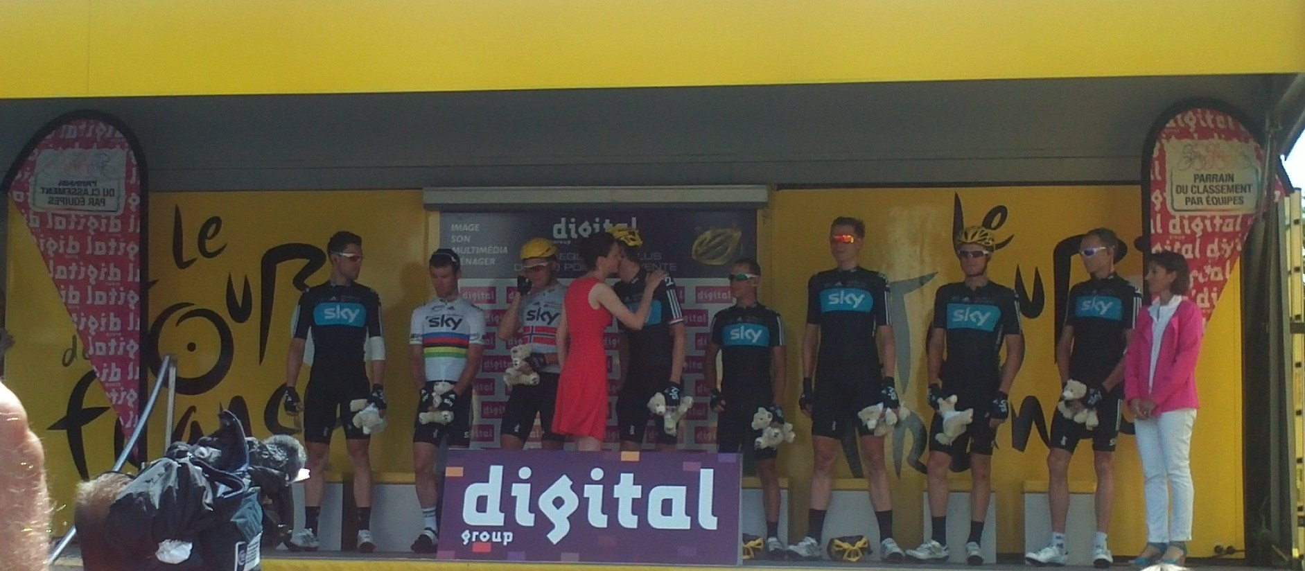 L'équipe Sky, leader du classement par équipes lors de la présentation des coureurs à Épernay avant la sixième étape du Tour de France.